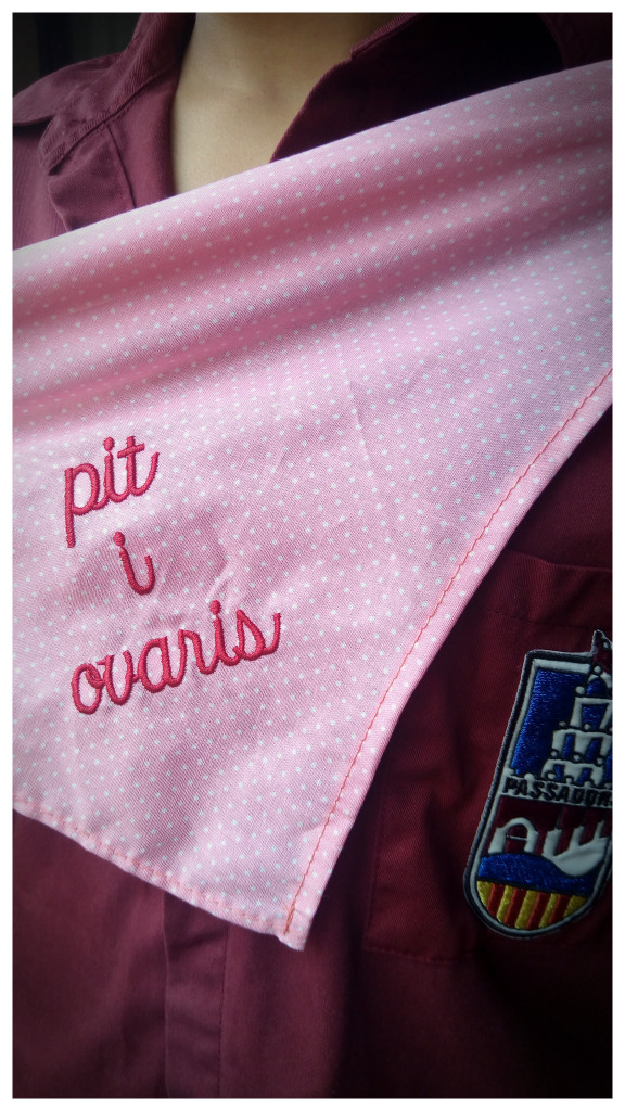 Mocador iniciativa dels Passadors per ajudar a les dones afectades pel càncer de mama.